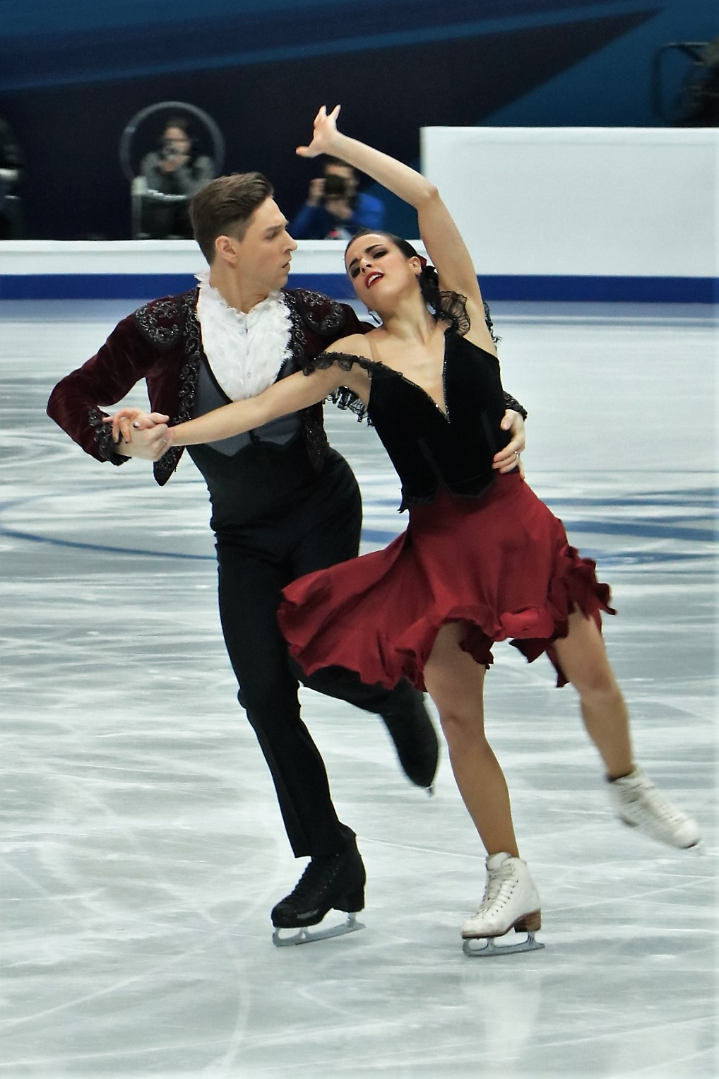 Сара Уртадо / Кирилл Халявин (Испания) на Чемпионате Европы по фигурному катанию 2018.